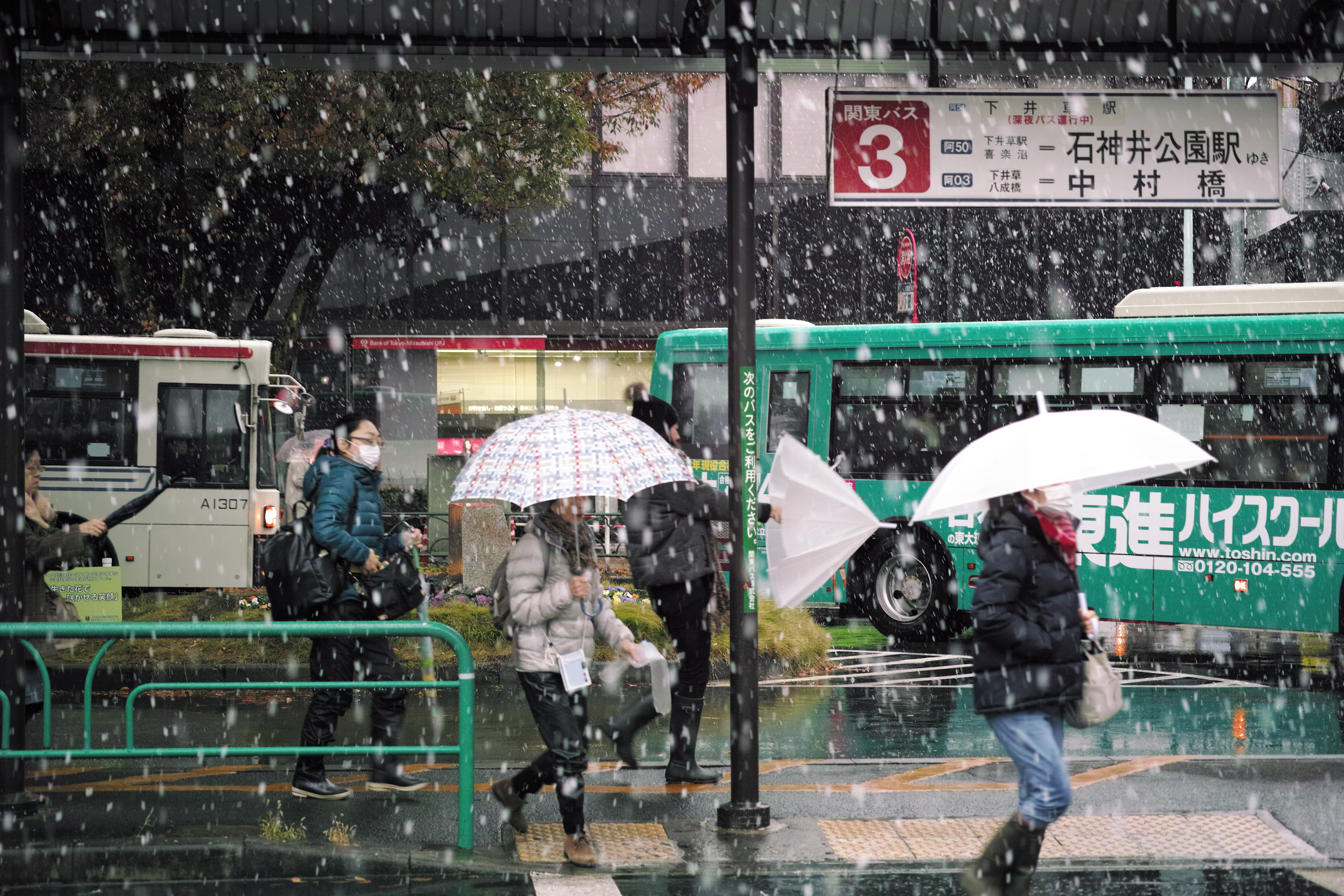 次のバスをご利用ください。